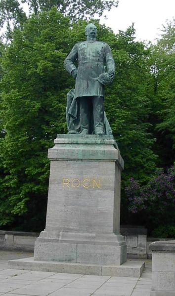 Albrecht Graf von Roon statue in Berlin-Tiergarten, sculpted by Harro Magnussen